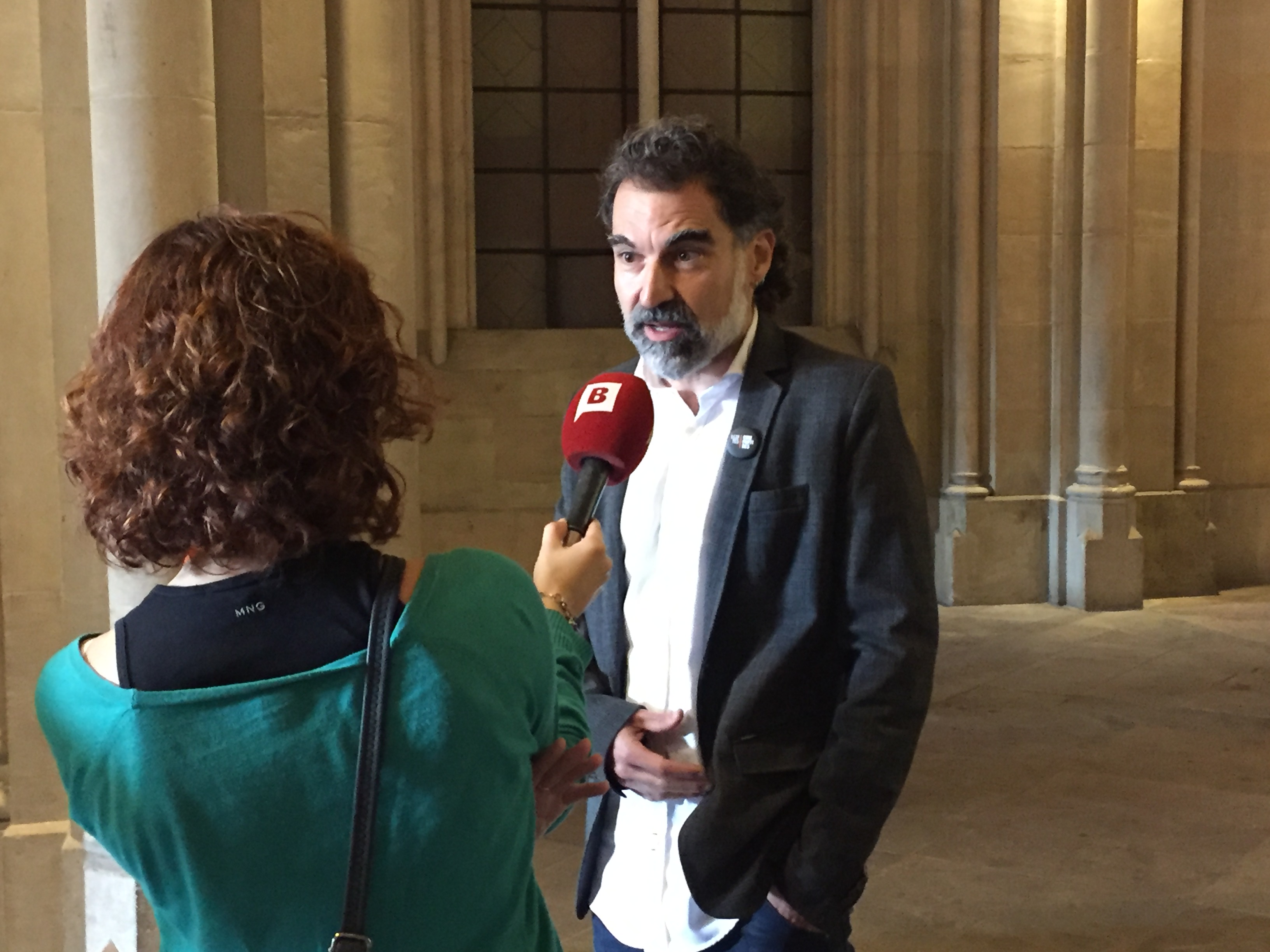 Jordi cuixart lluites compartides